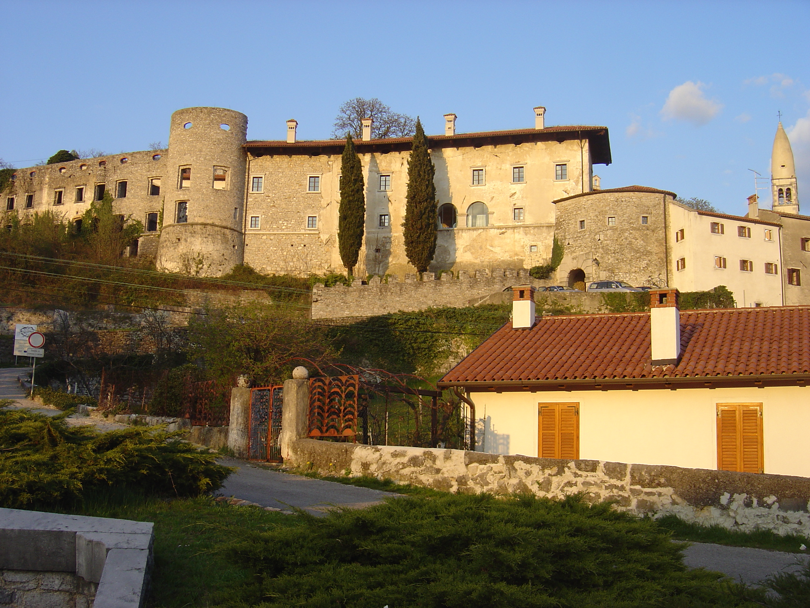 Štanjel, Komen, Slovenia